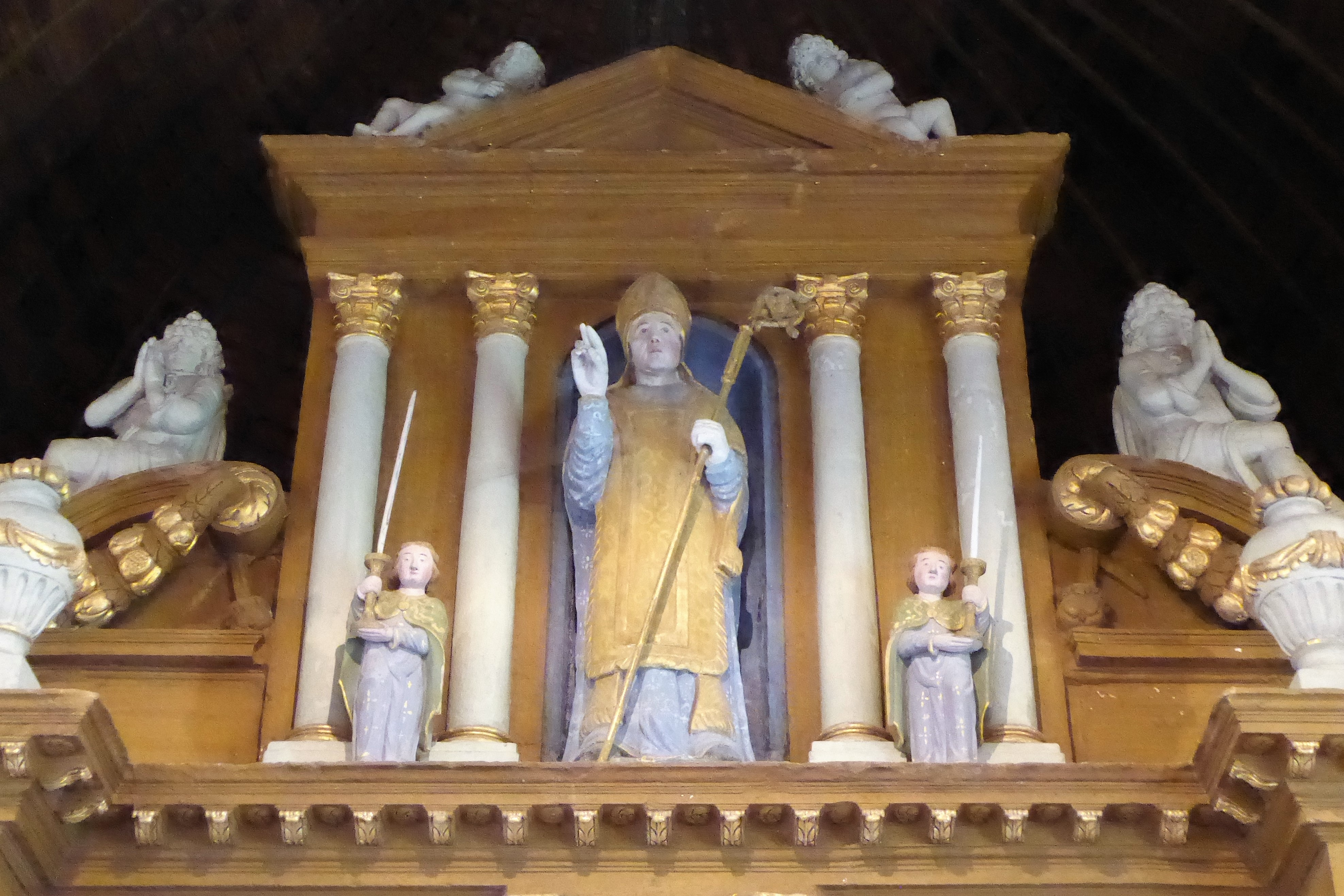 statue de Saint Lubin, église Saint-Lubin, Chassant, Eure-et-Loir, France.